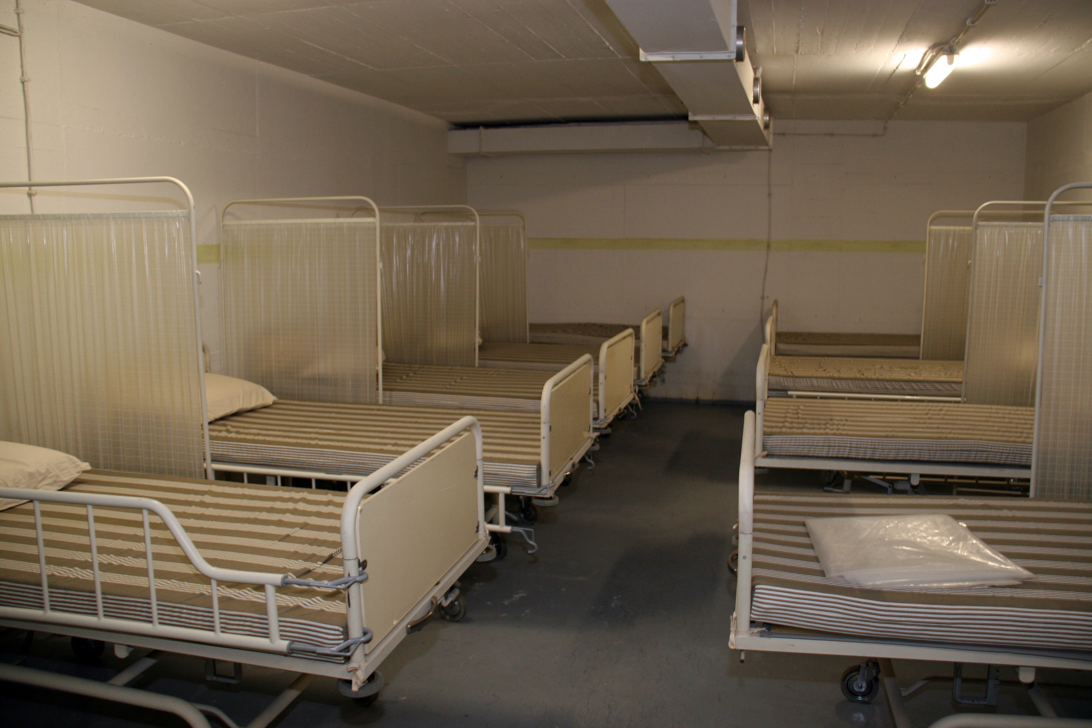 Patientenbereich für frischoperierte Patienten (Aufwachbereich) im Hilfskrankenhaus Gunzenhausen, Nov. 2009